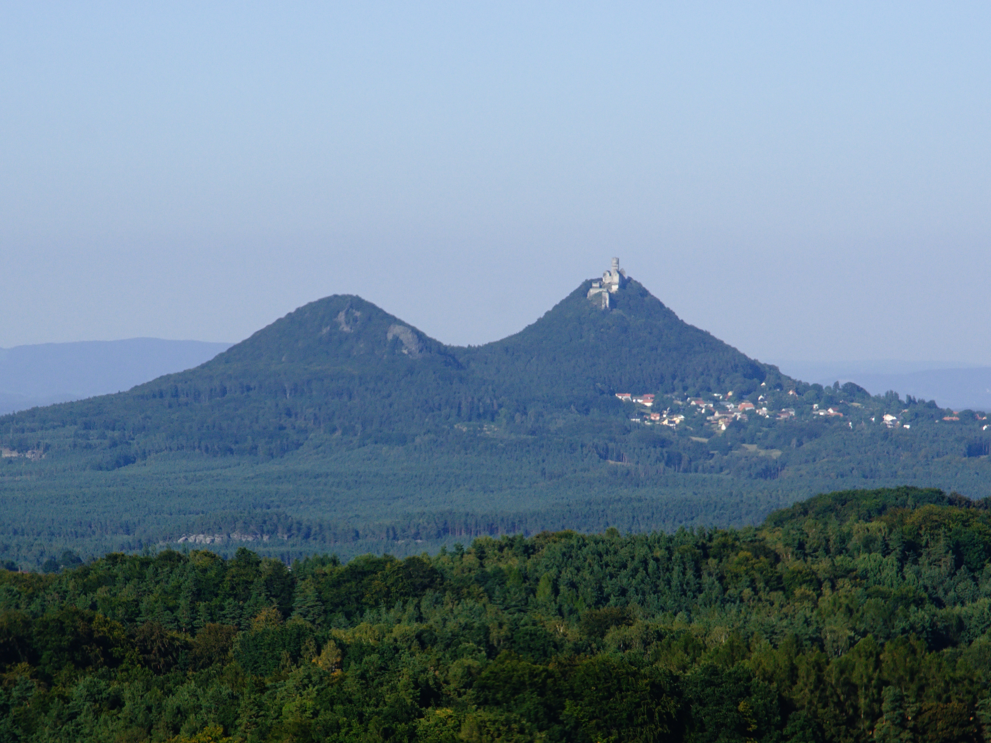 Pohled na hrad Bezděz z hradu Houska